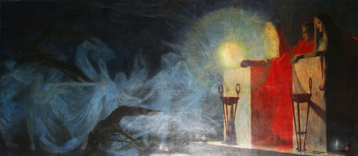 Valpurgina noć, rad Bele Čikoša Sesije u Hrvatskom institutu za povijest u Zagrebu